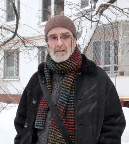 Александр_Бутузов